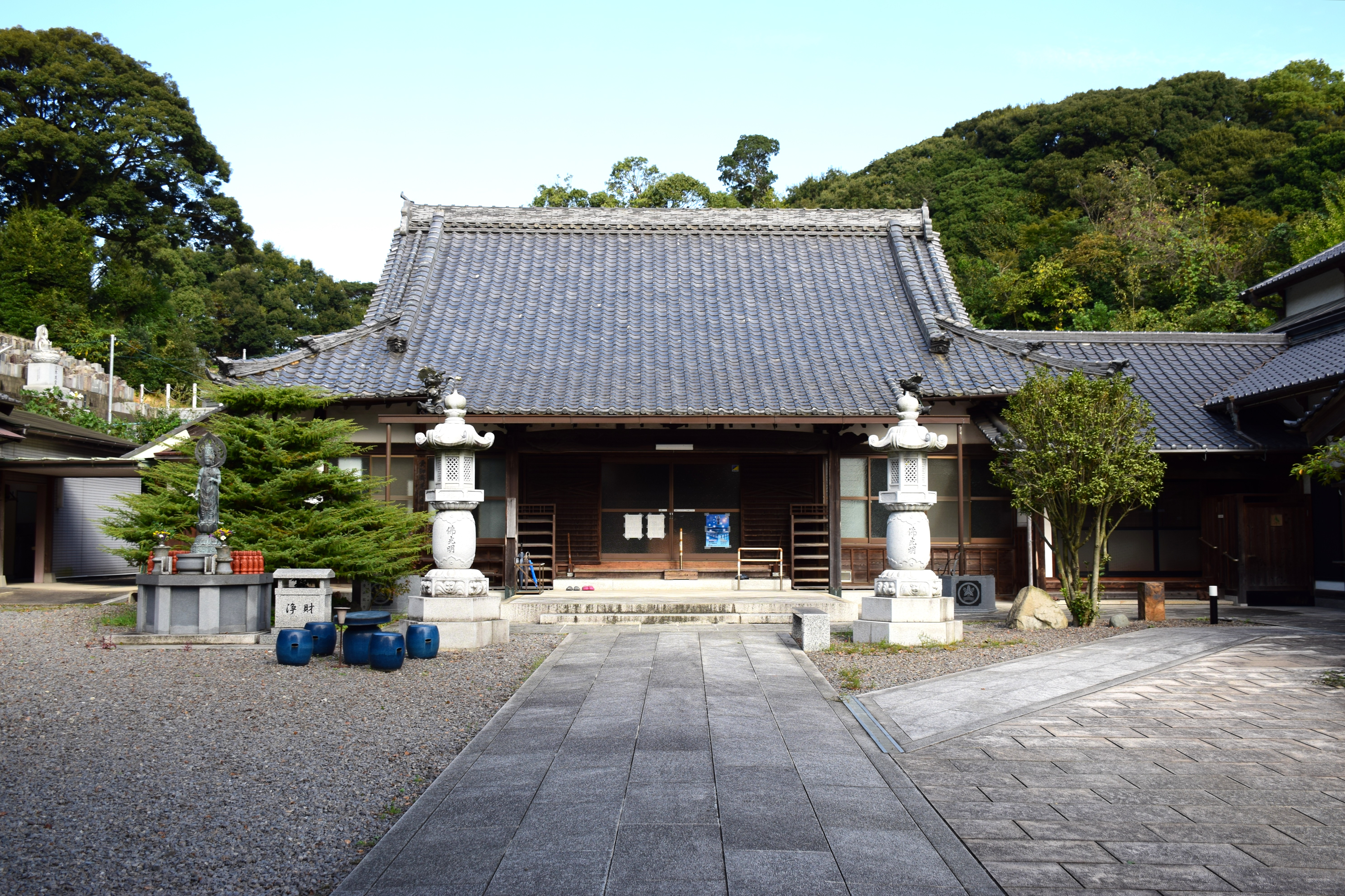 正盛院本堂